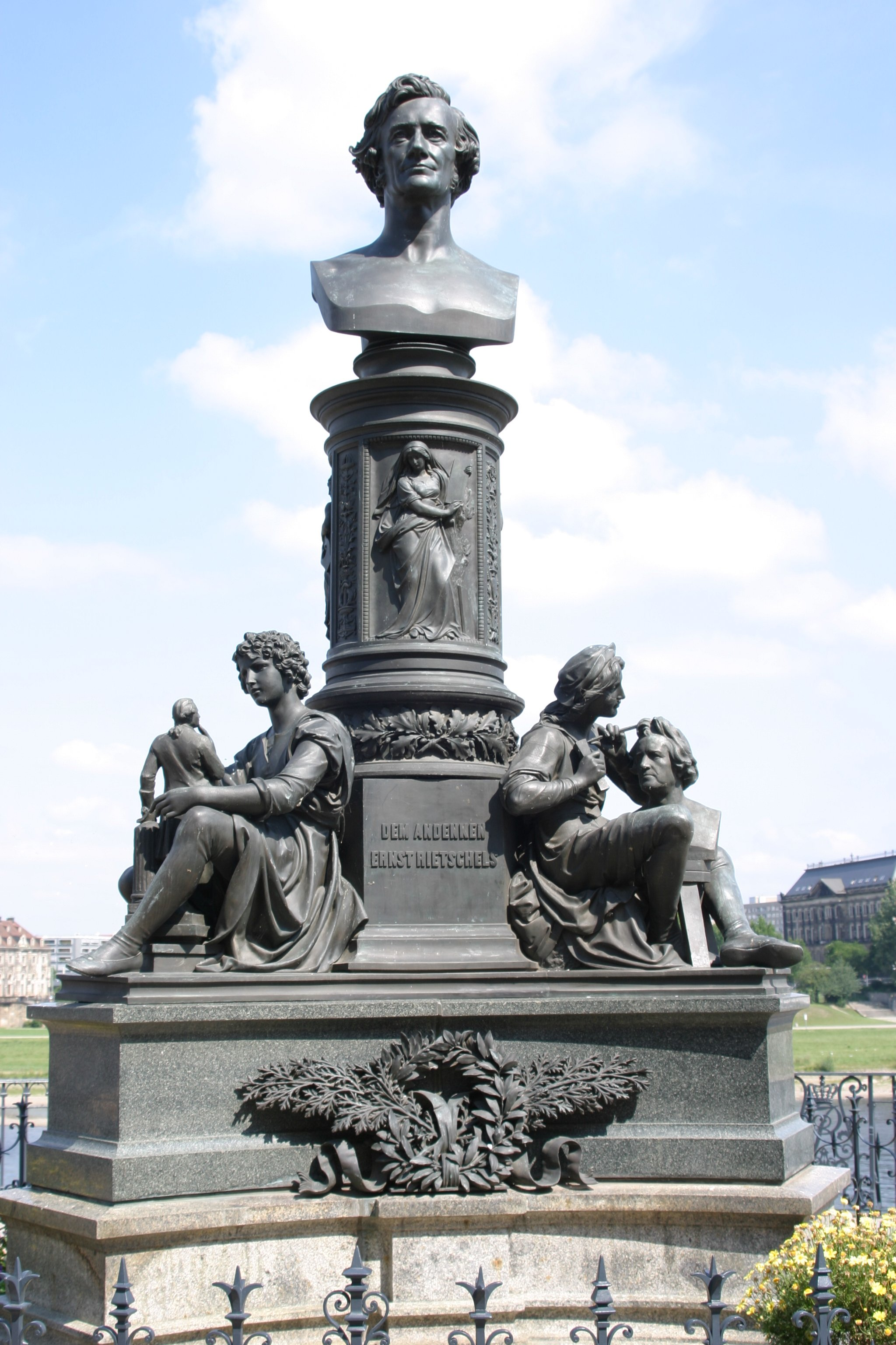 Ernst Rietschel-Denkmal von Johannes Schilling auf der Brühlschen Terrasse in Dresden